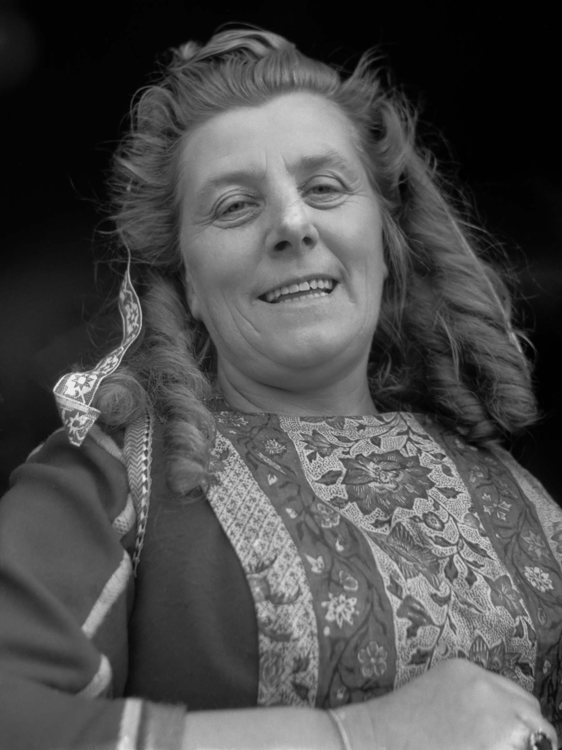 Sijtje Boes (Marken) 16 november 1948